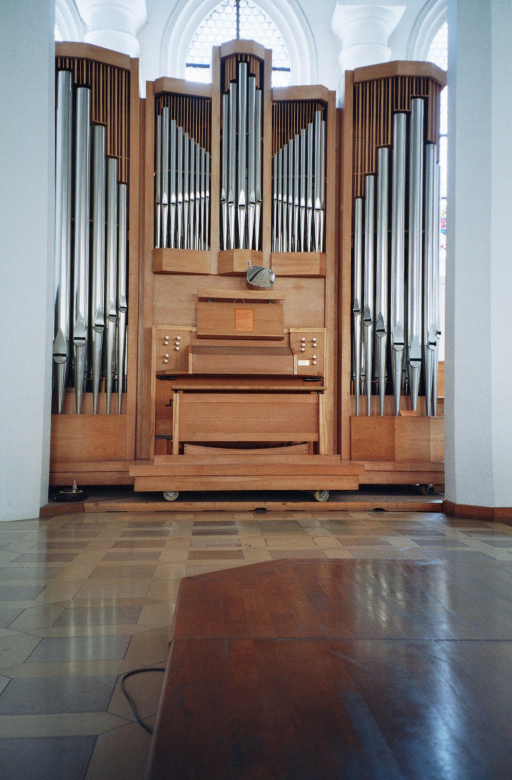 Chororgel von St. Stephan von 1975